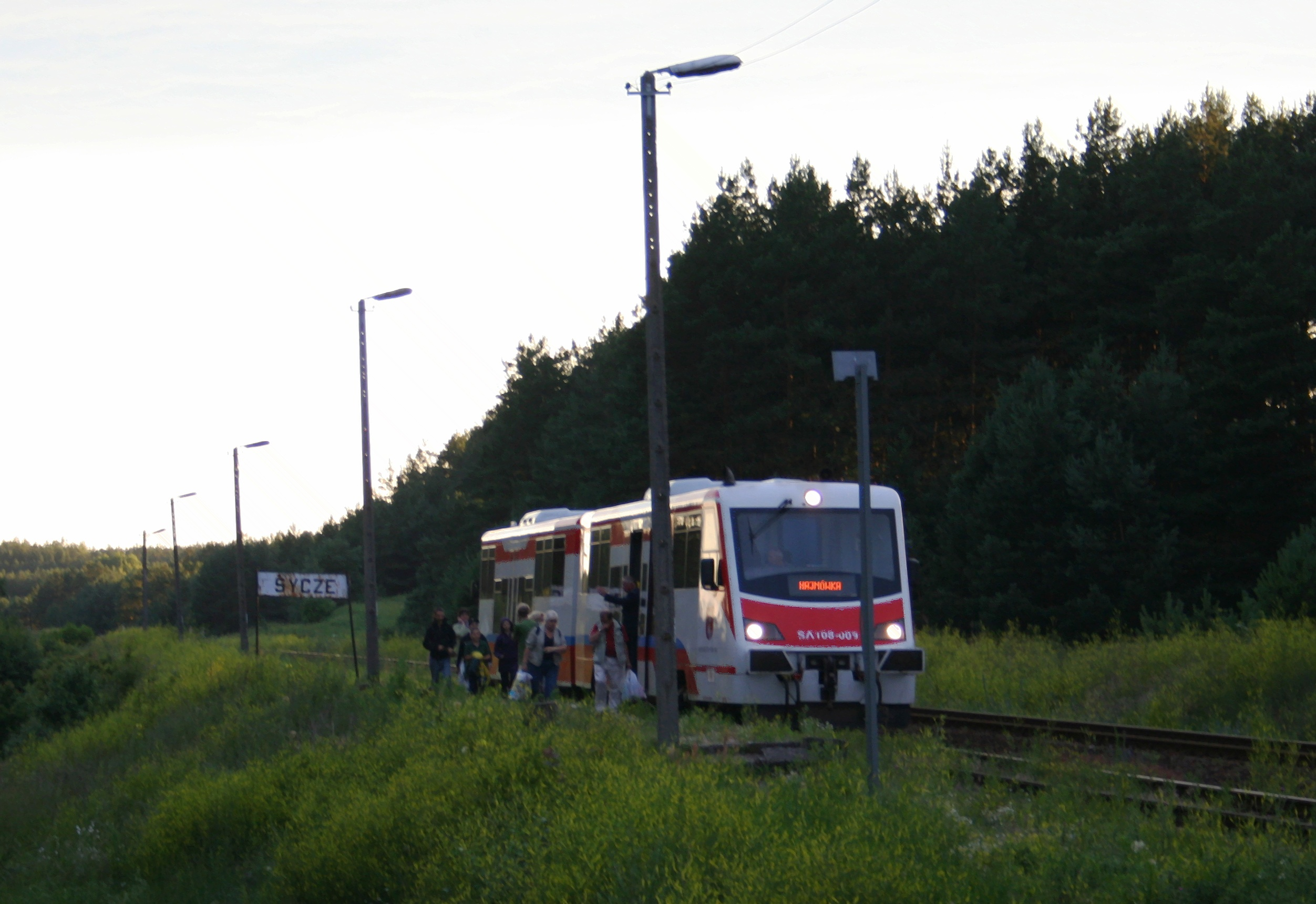 przystanek kolejowy w miejscowości Sycze, gmina Nurzec-Stacja, woj. podlaskie